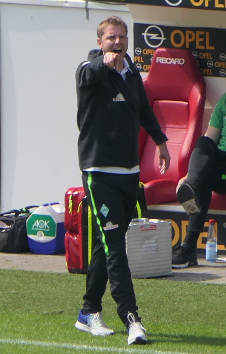 Der Fussballtrainer vom SV Werder Bremen, Florian Kohfeldt, beim Auswärtsspiel gegen den FSV Mainz 05 am 12.05.2018.